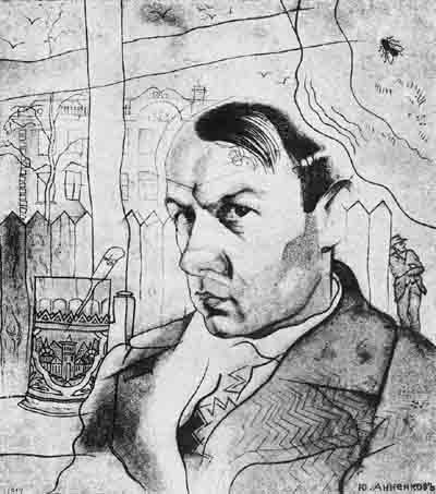 Ю.П.Анненков. Автопортрет. 1917. Акварель, цветная тушь